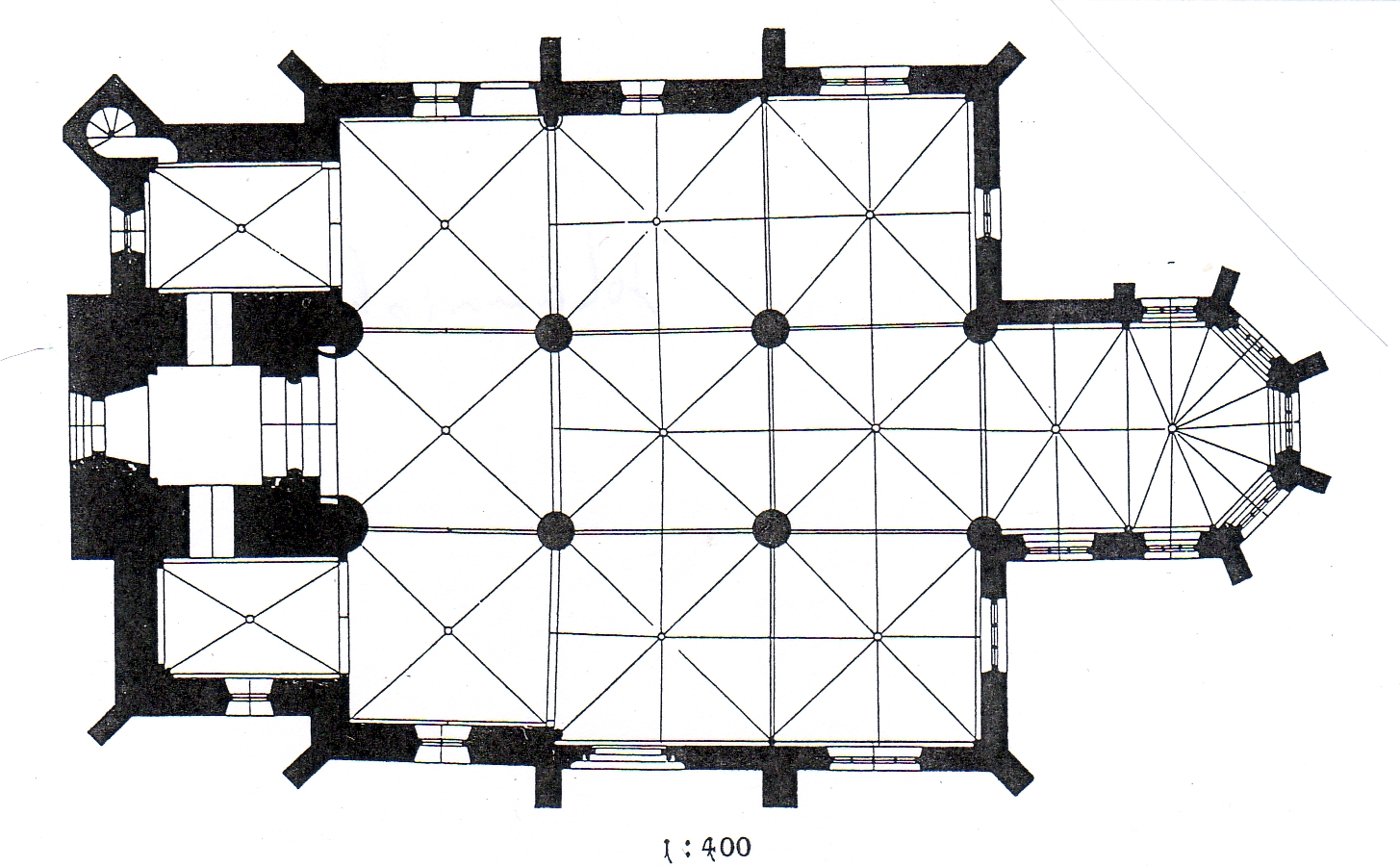 St. Johannis Herford